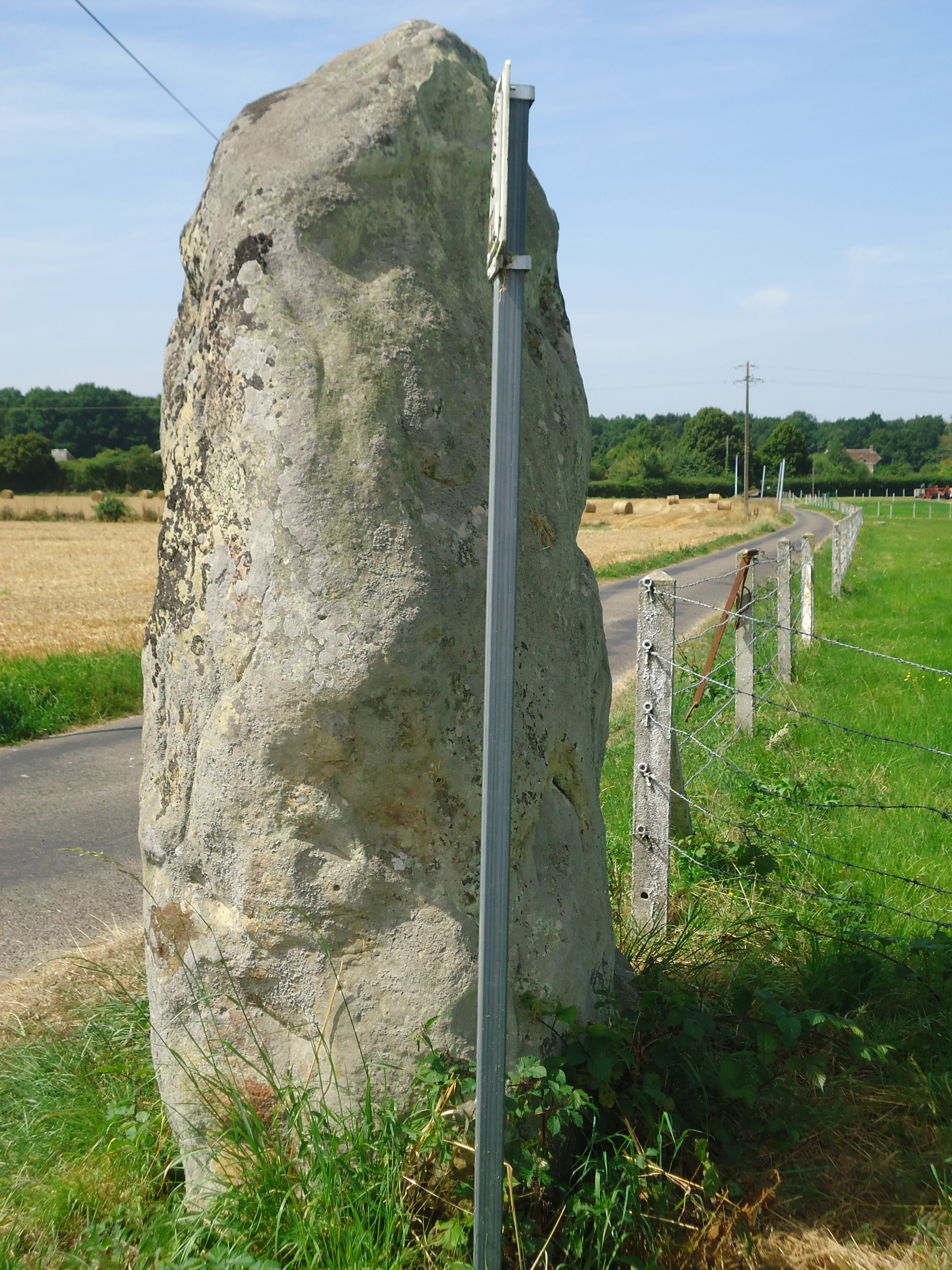 Menhir de la Longue-Pierre à Landepéreuse dans l'Eure